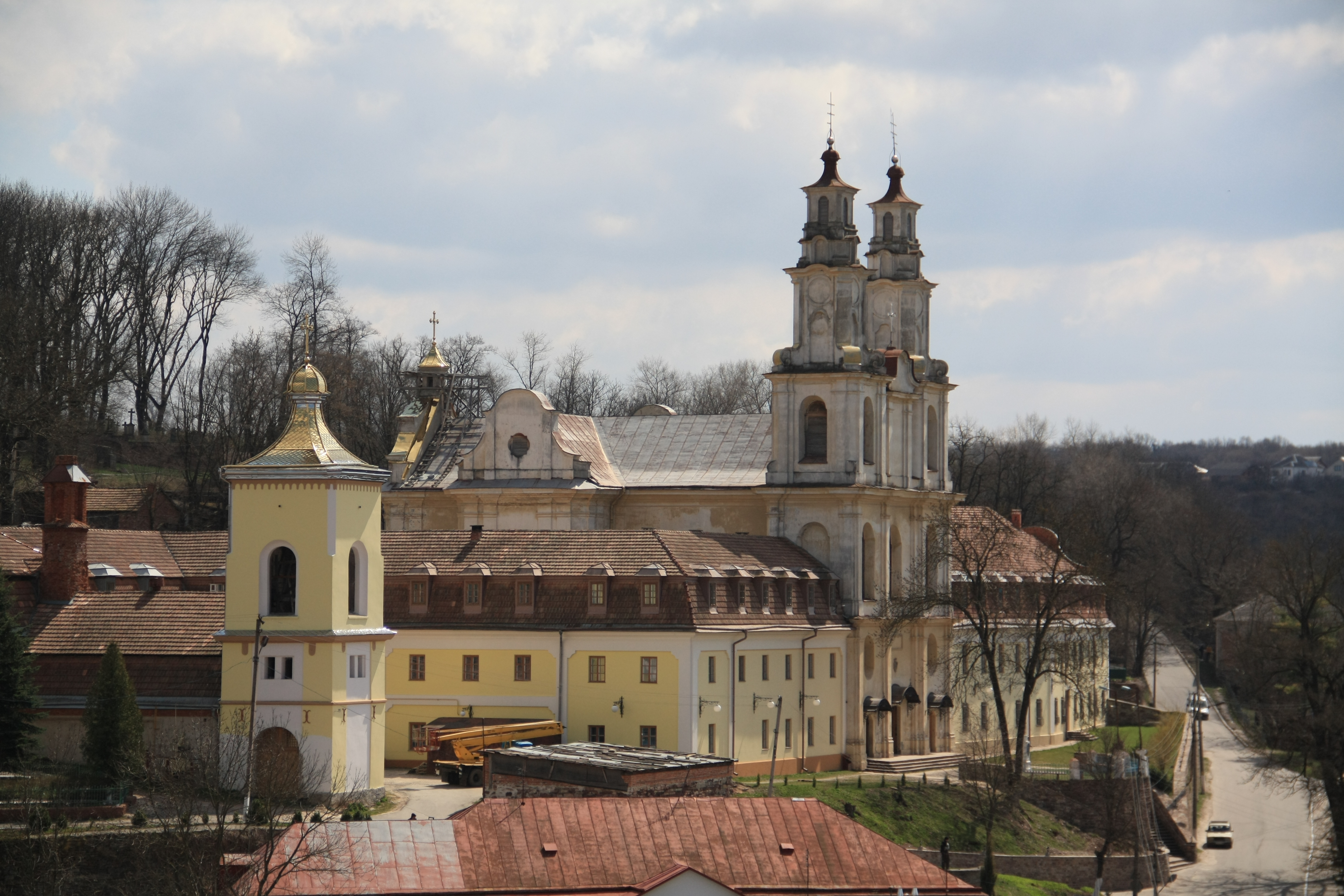 Вигляд з ратуші на Василіянський монастир у Бучачі